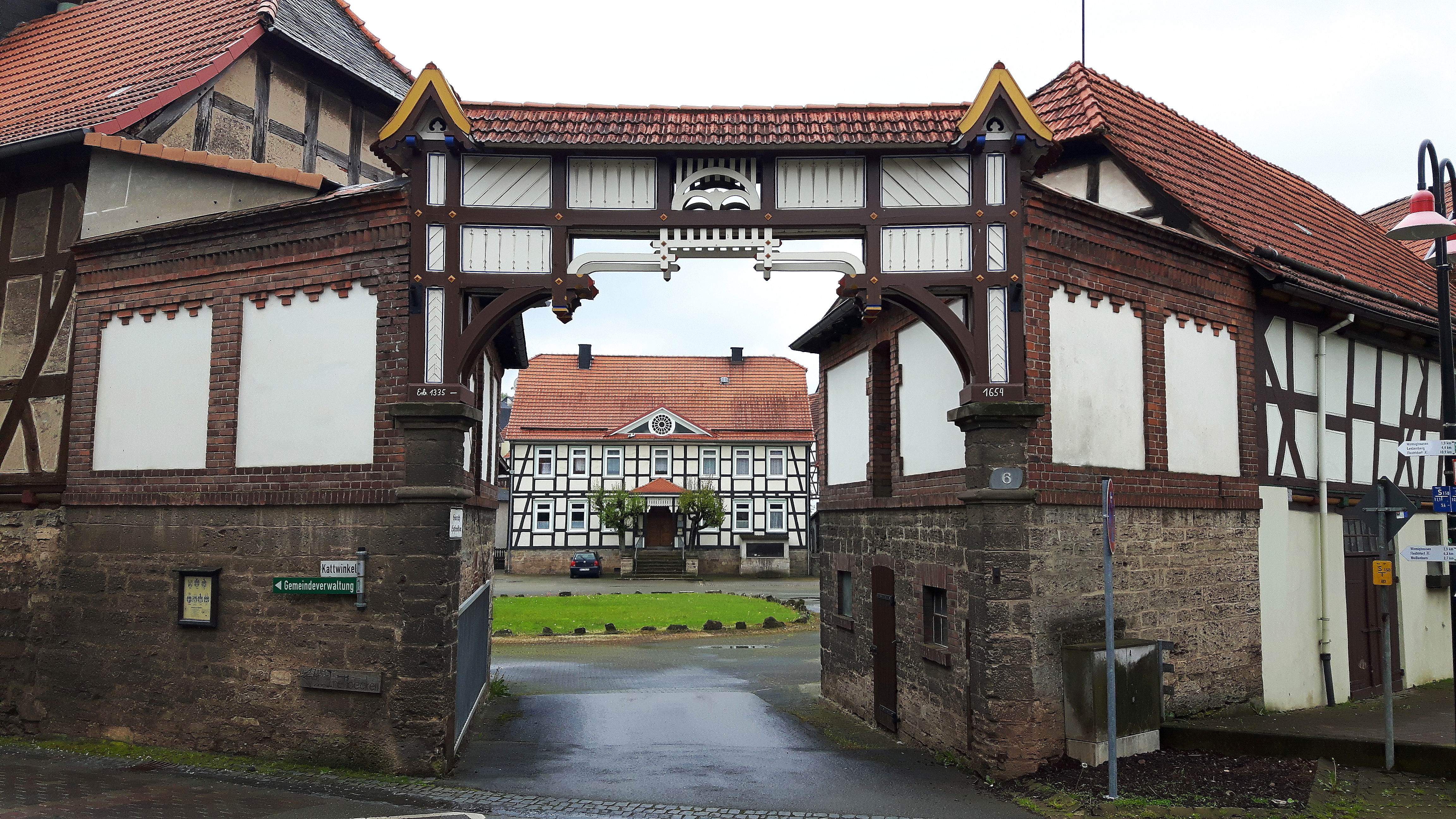 Ehemalige Burg Adorf, heutiges Herrenhaus in Adorf, Gemeinde Diemelsee